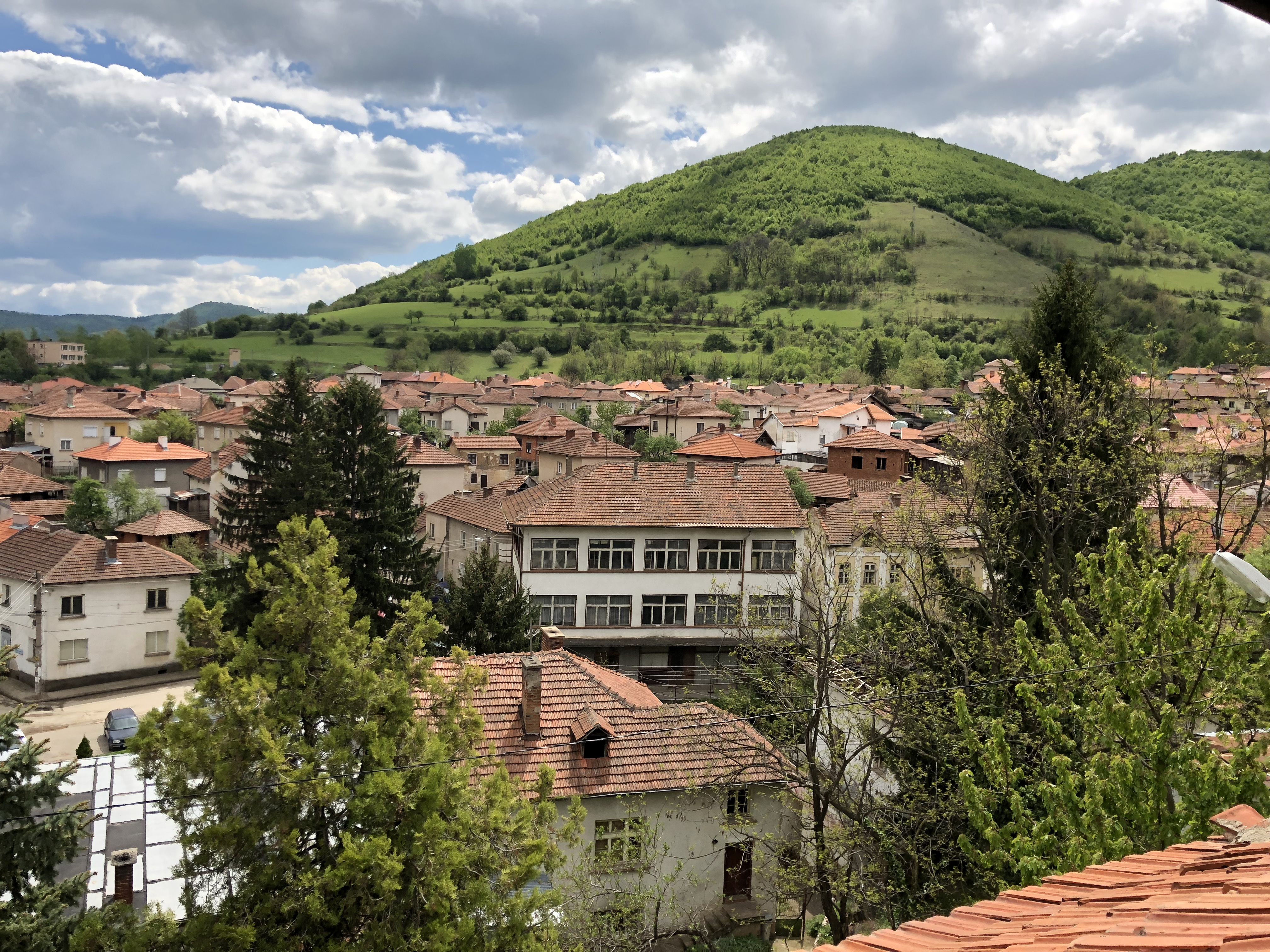 Пролет в град Чипровци